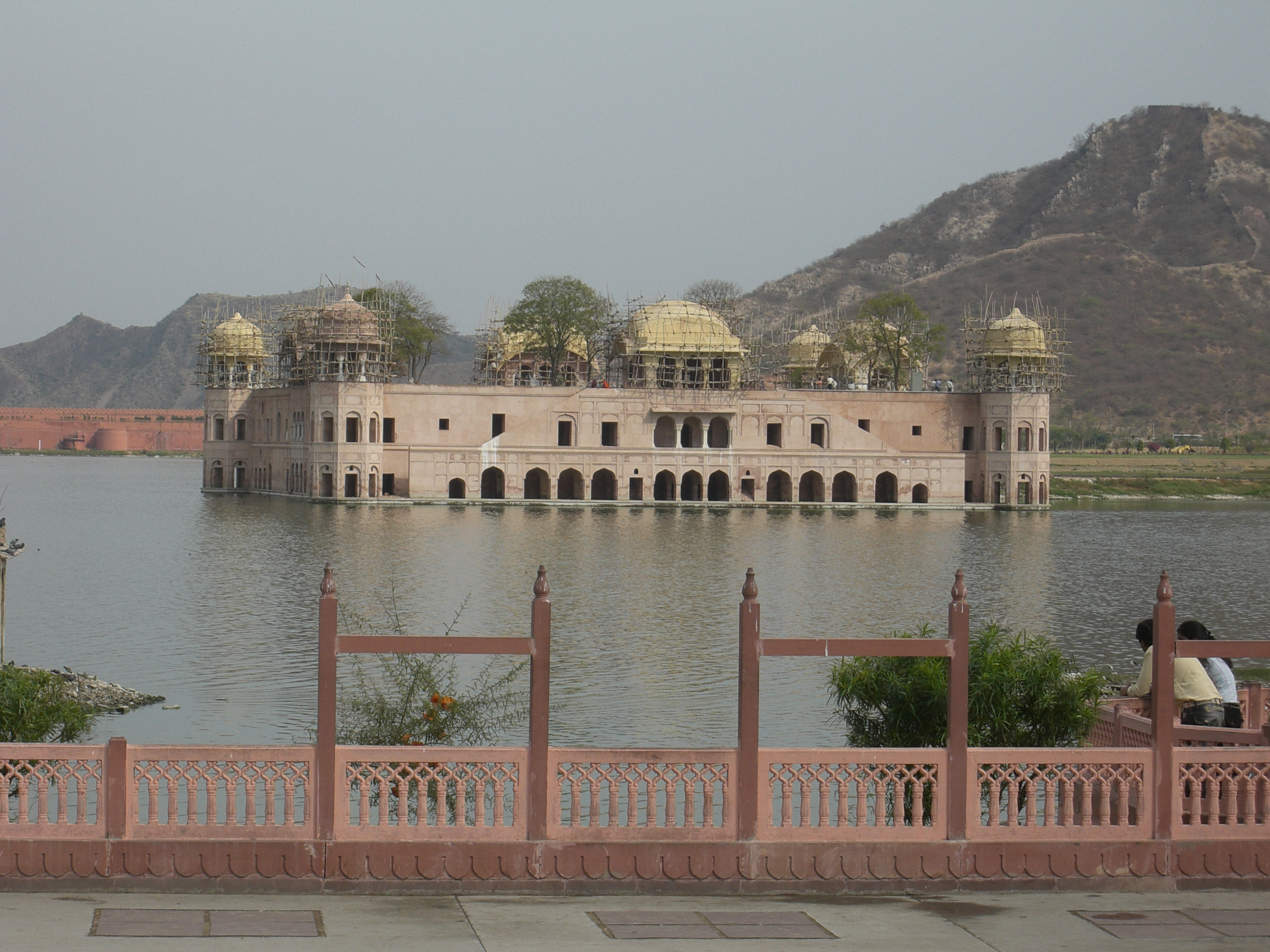 Jal Mahal, Water Palace, Jaipur India